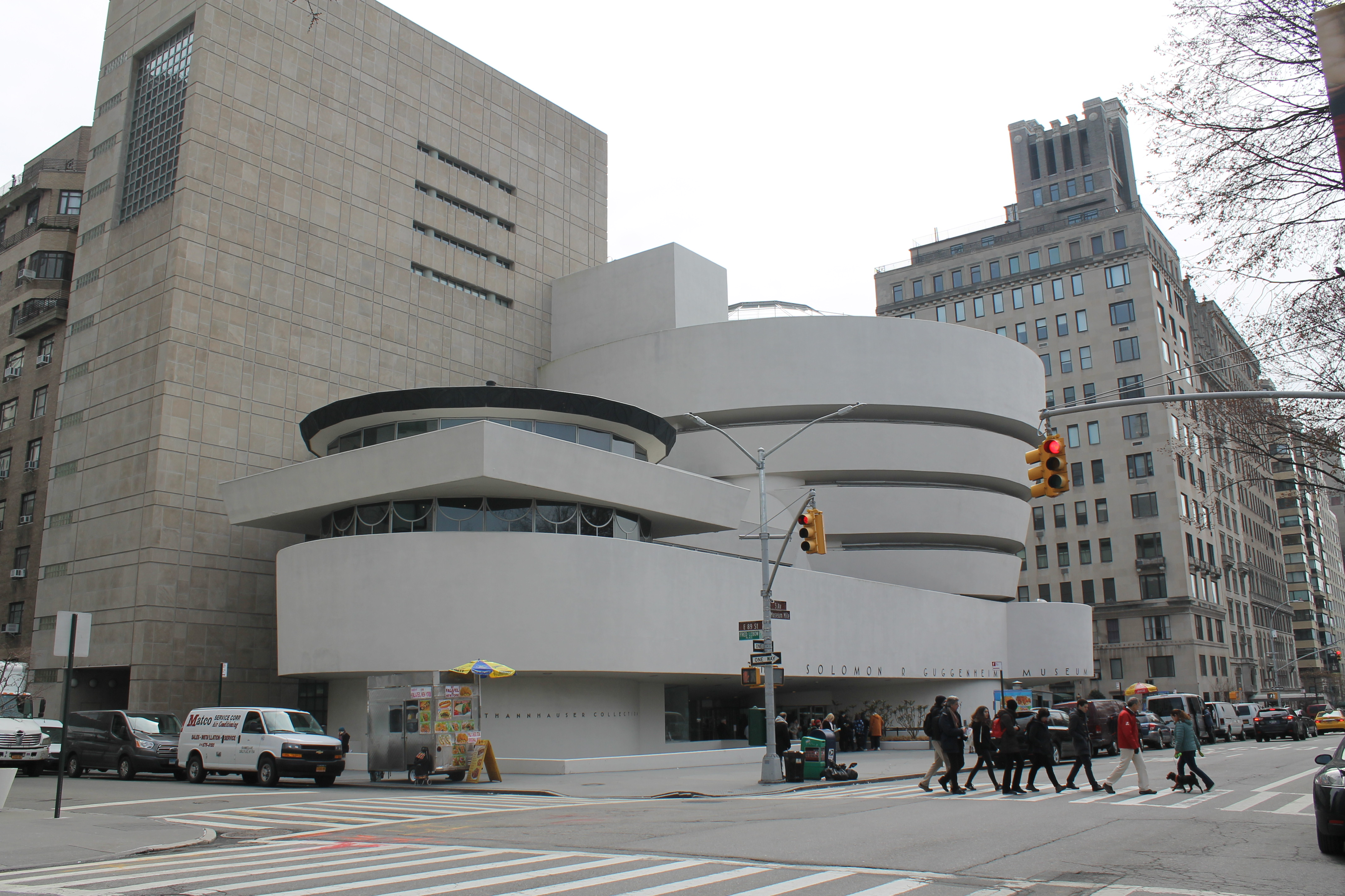 Museo Solomon R. Guggenheim de Nueva York (marzo de 2018).